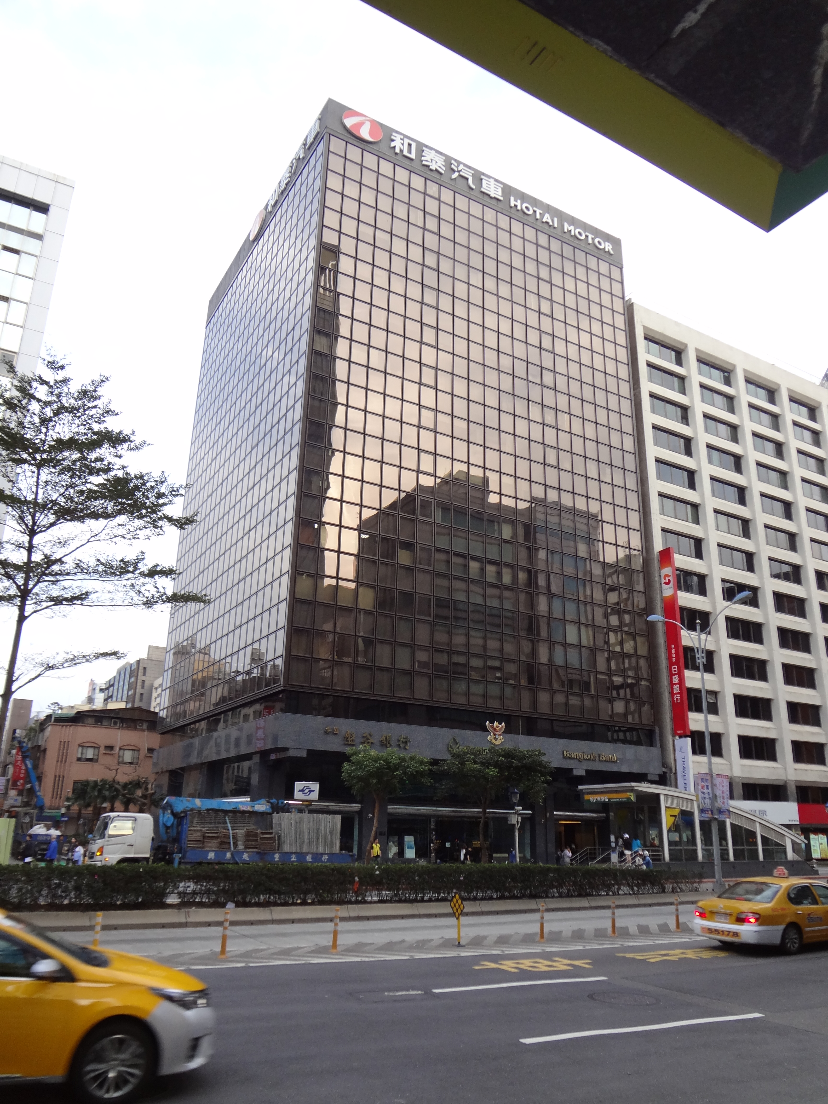 「和泰汽車大樓」是和泰汽車總部，位於臺灣臺北市中山區松江路121號，1樓是盤谷銀行台北分行，8至14樓是和泰汽車總部，12樓是國瑞汽車總部，15樓是和運租車總部。